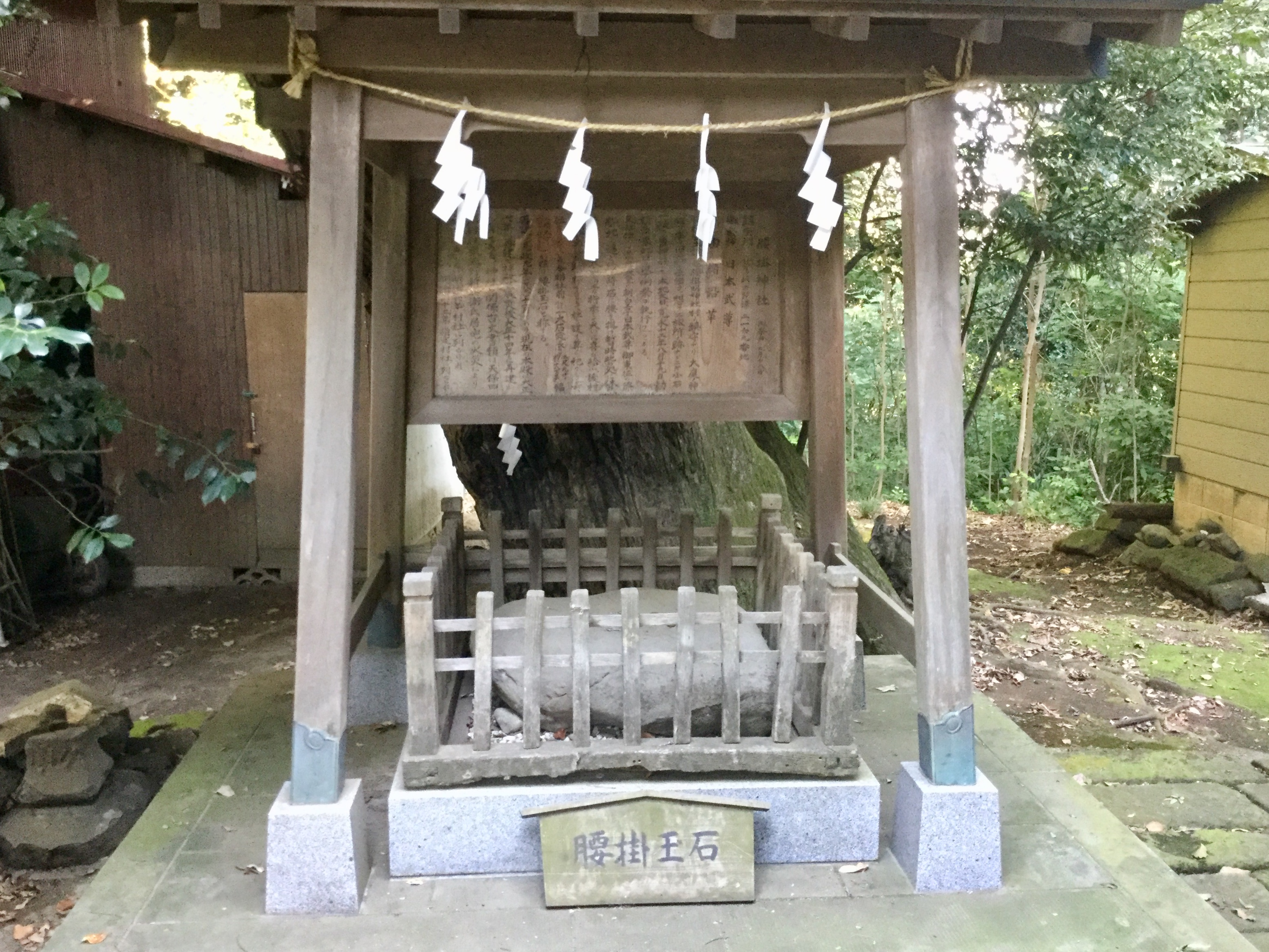 腰掛神社の腰掛玉石。